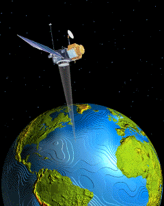 Altimetrie-Satellit Topex-Poseidon (Radar-Höhenmessung über dem Meeresspiegel)